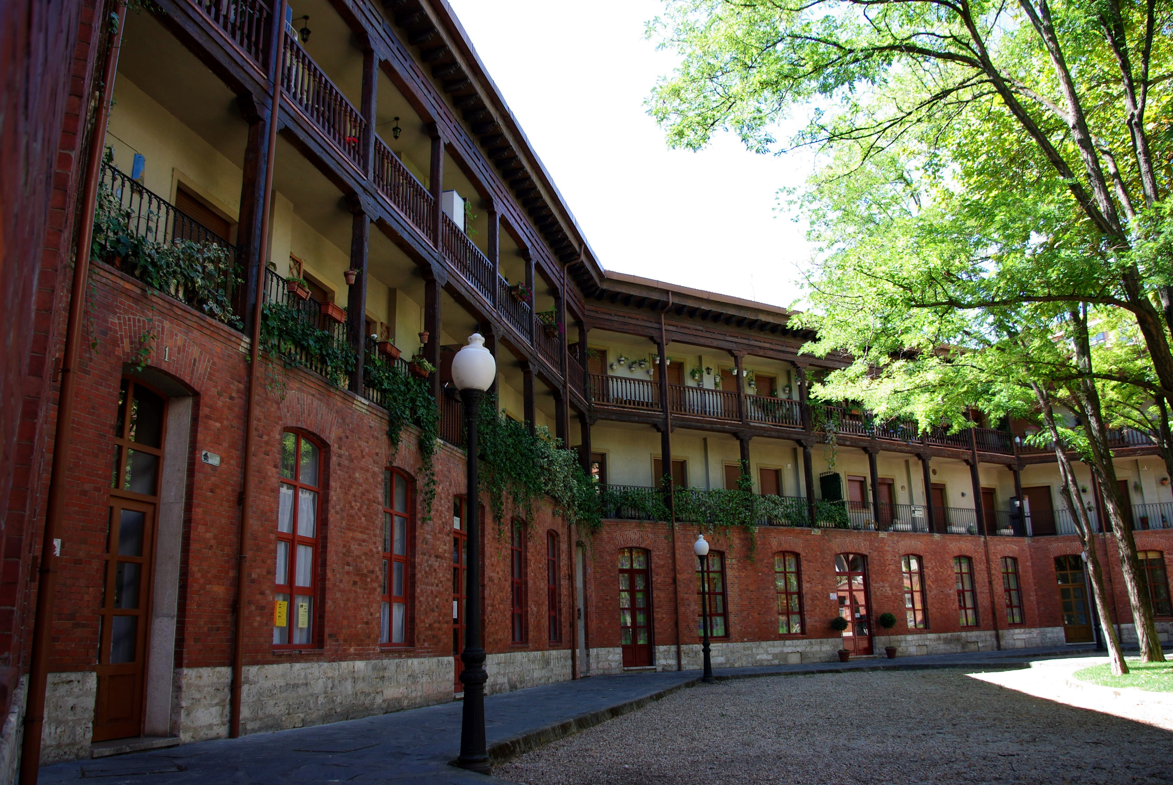 Primer plaza de toros octogonal,data la construcion de 1883 150.244.129.